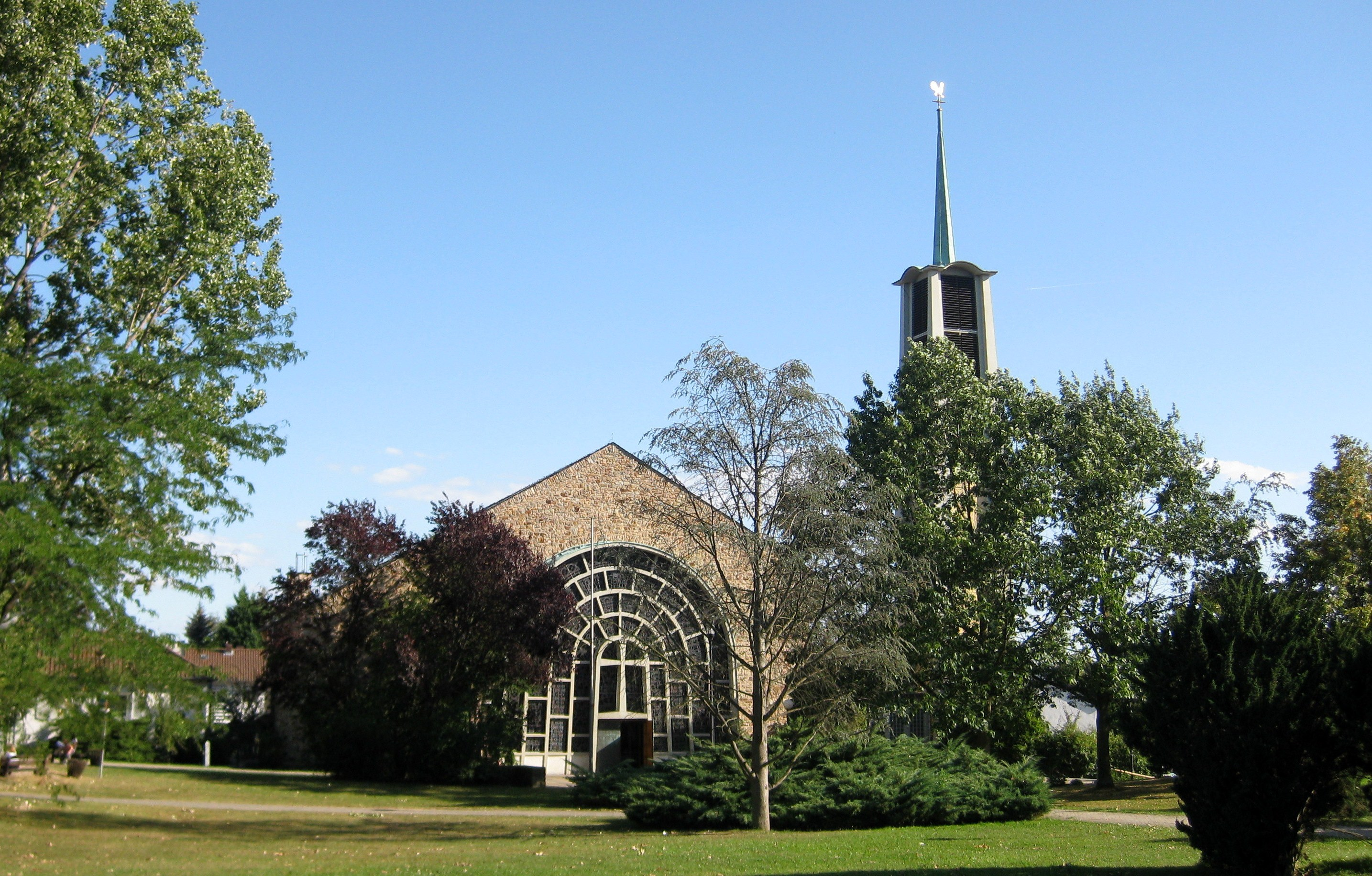 Bad Soden am Taunus kath. Kirche